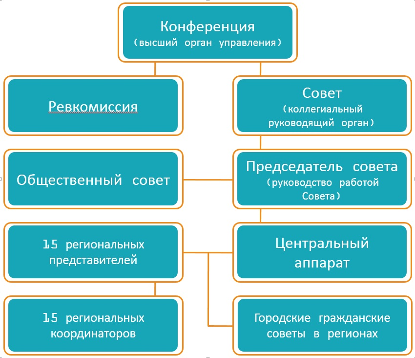 Структура общенационального движения "Казахстан 2050"